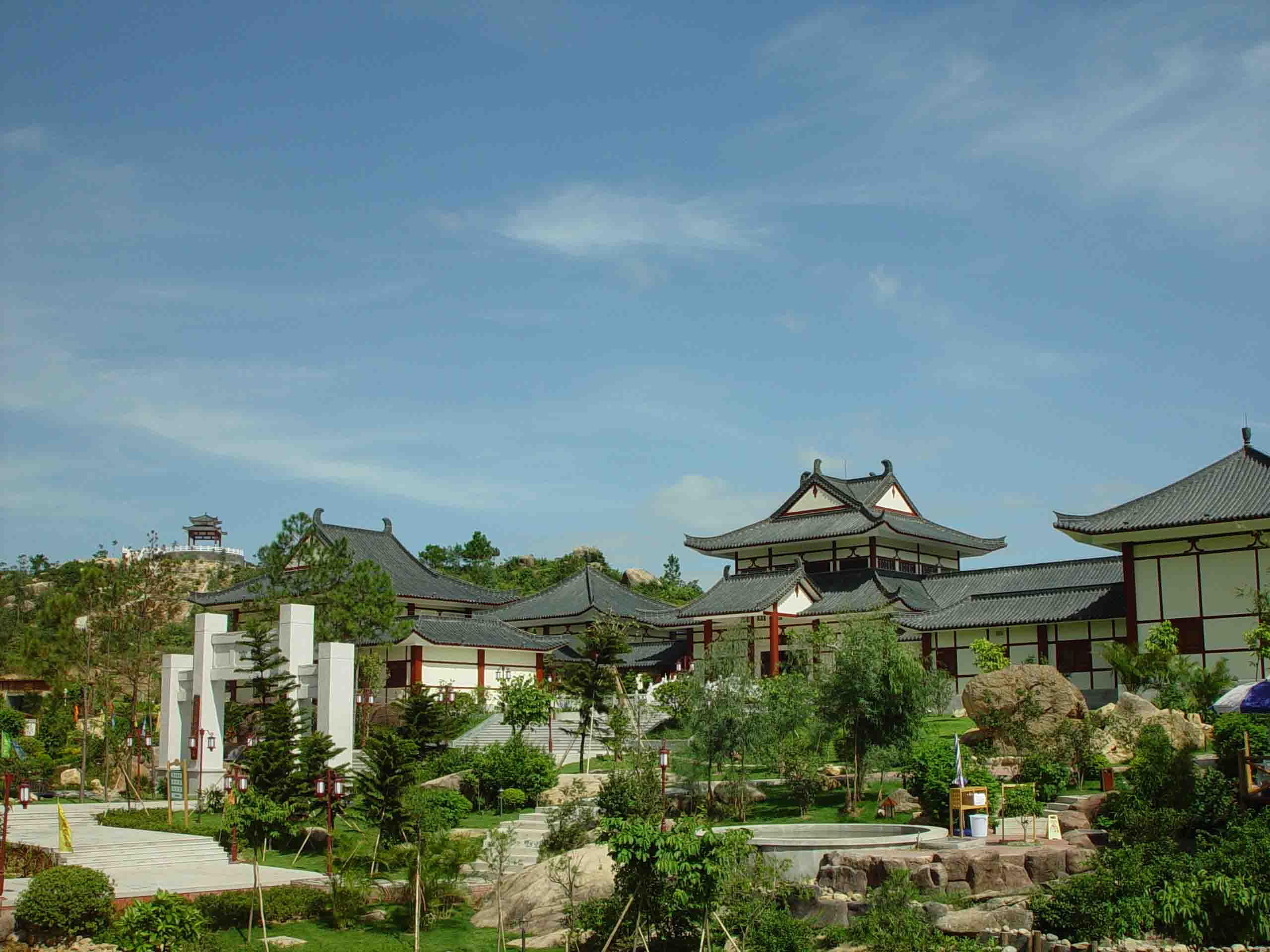 這是古兜溫泉的唐官